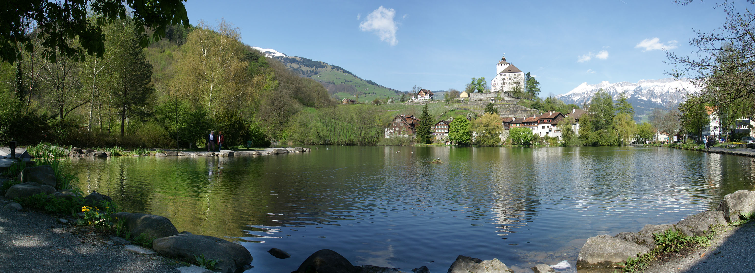 Buchs SG – Schloss und Städtli Werdenberg am Werdenbergseeli. Aus 2 Querformataufnahmen vom 27.04.2008 10:39 Uhr. EXIF Daten: 1/200 s - f/9 - ISO 100 - 16 mm - 24 mm KB. Aufnahmestandort: 450 m - 753635 / 226020 (47° 10' 2.25" N, 9° 27' 54.68" E)